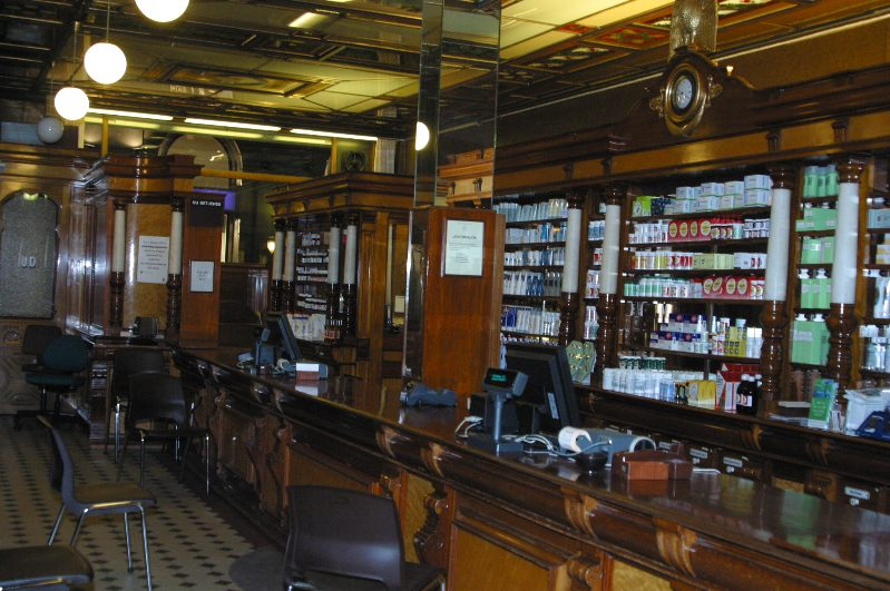 Interiør fra Svaneapoteket i Oslo